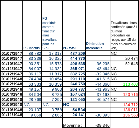 Source : Archives nationales contemporaines de Fontainebleau - Côte 770623/85, Tableau réalisés à partir des reports mensuels établis par le Ministère des forces armées, « Situation de la main-d’œuvre étrangère (Ministre des forcées armées) », Notes du 19/2/48, 17/3/48, 1/4/48, 25/11/48, 14/10/48, 25/9/47, 22/7/47Effectifs totaux des PG, des travailleurs libres confirmés et calcul des diminutions mensuelles de PG de juillet 1947 à novembre 1948(données de certains mois manquantes)